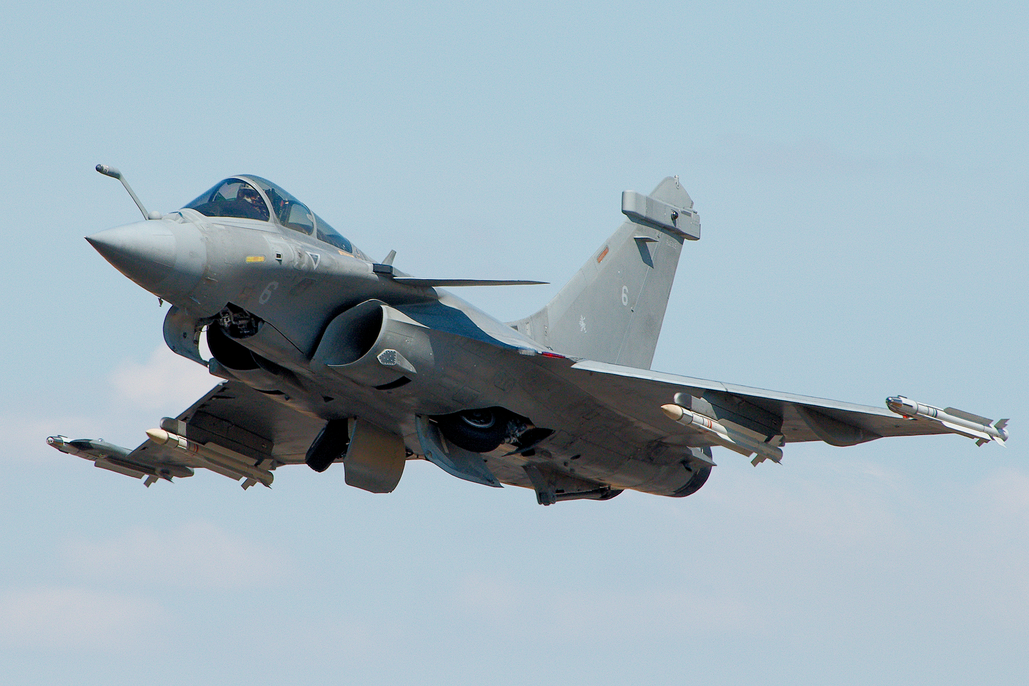 Rafale - RIAT 2018